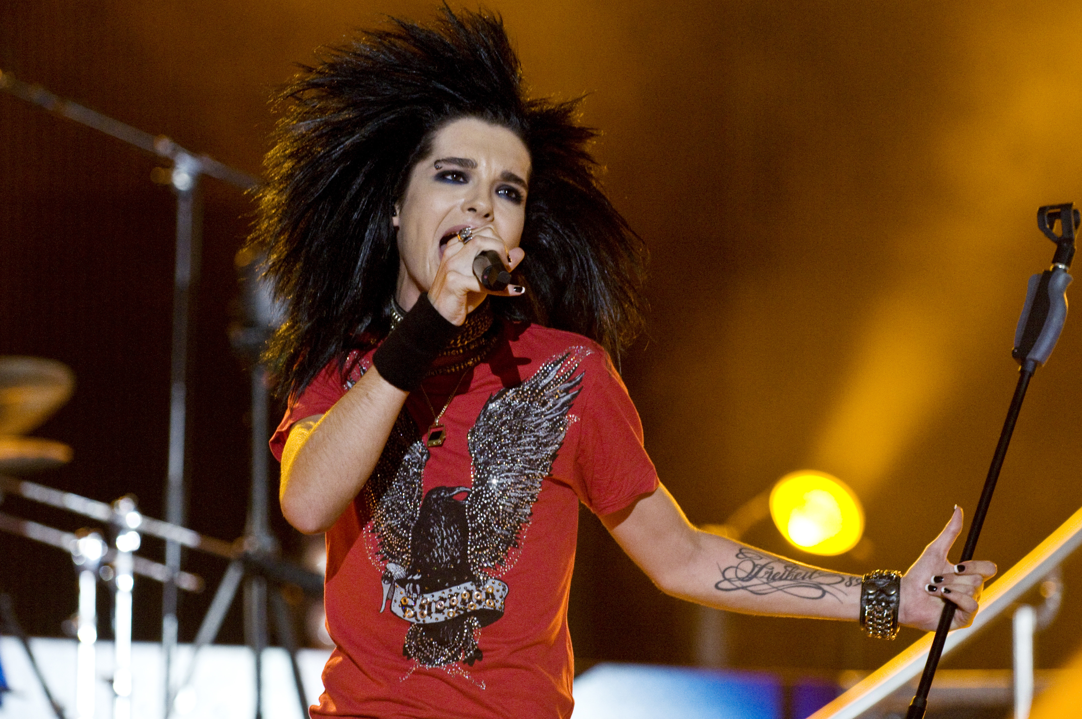 Tokio Hotel (Bill Kaulitz)